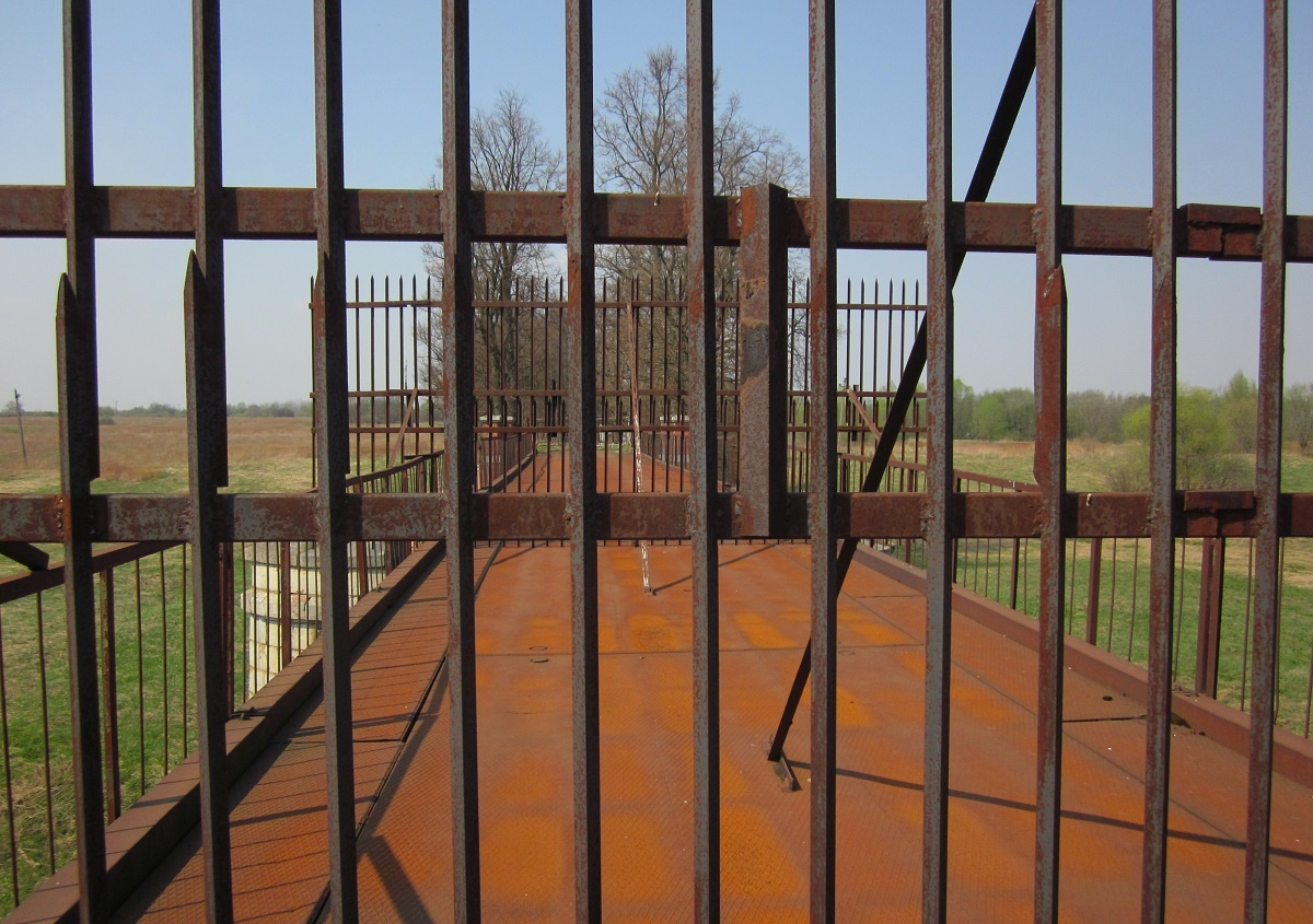 Geschlossene Brücke über die Širvinta an der Grenze von Litauen zur Oblast Kaliningrad, zwischen Kudirkos Naumiestis und Kutusowo.